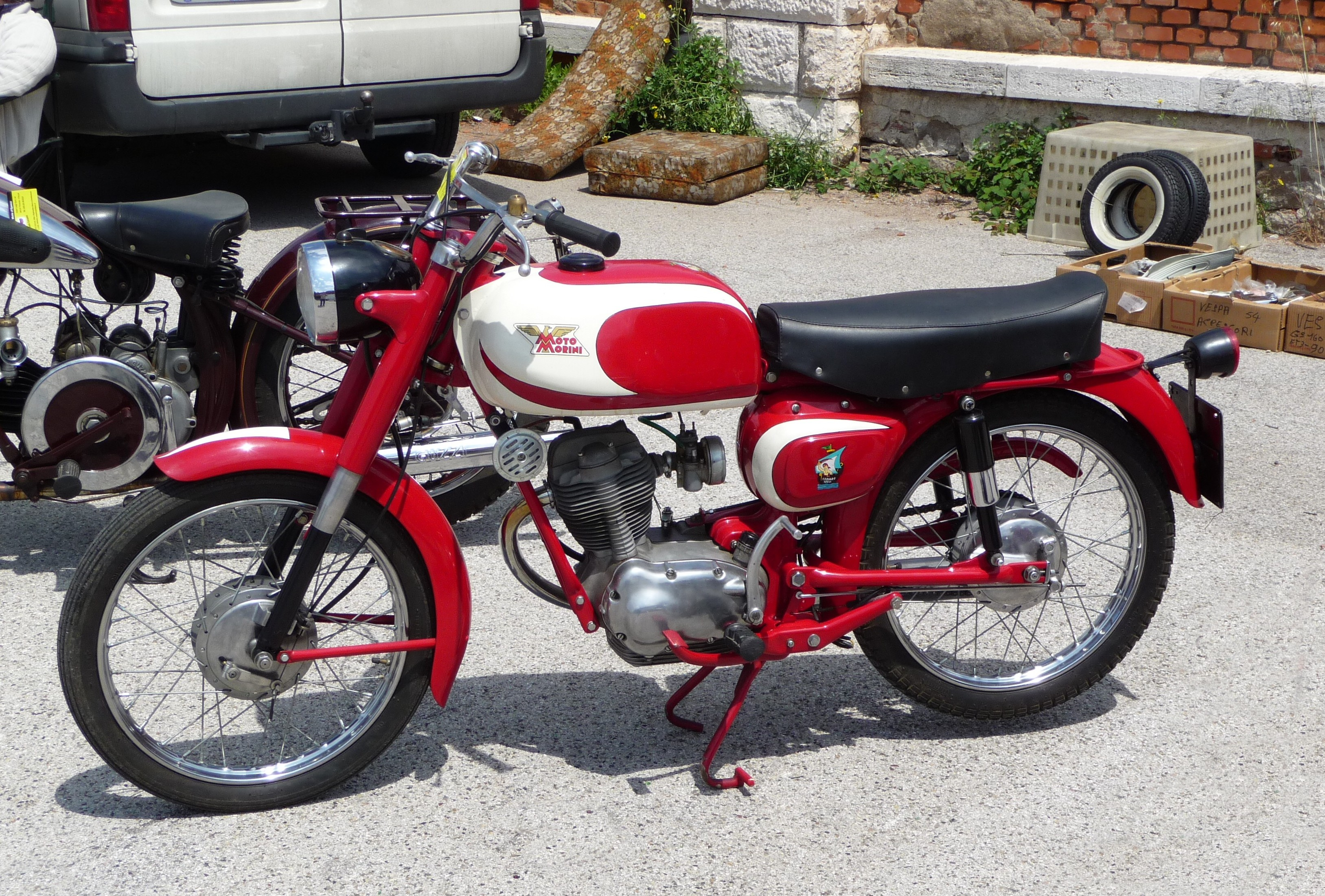 Motocycle Moto Morini